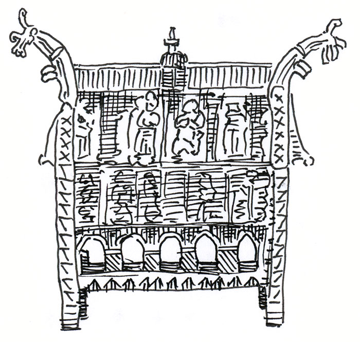 Skisse av et antatt norsk relikvieskrin fra middelalderen.